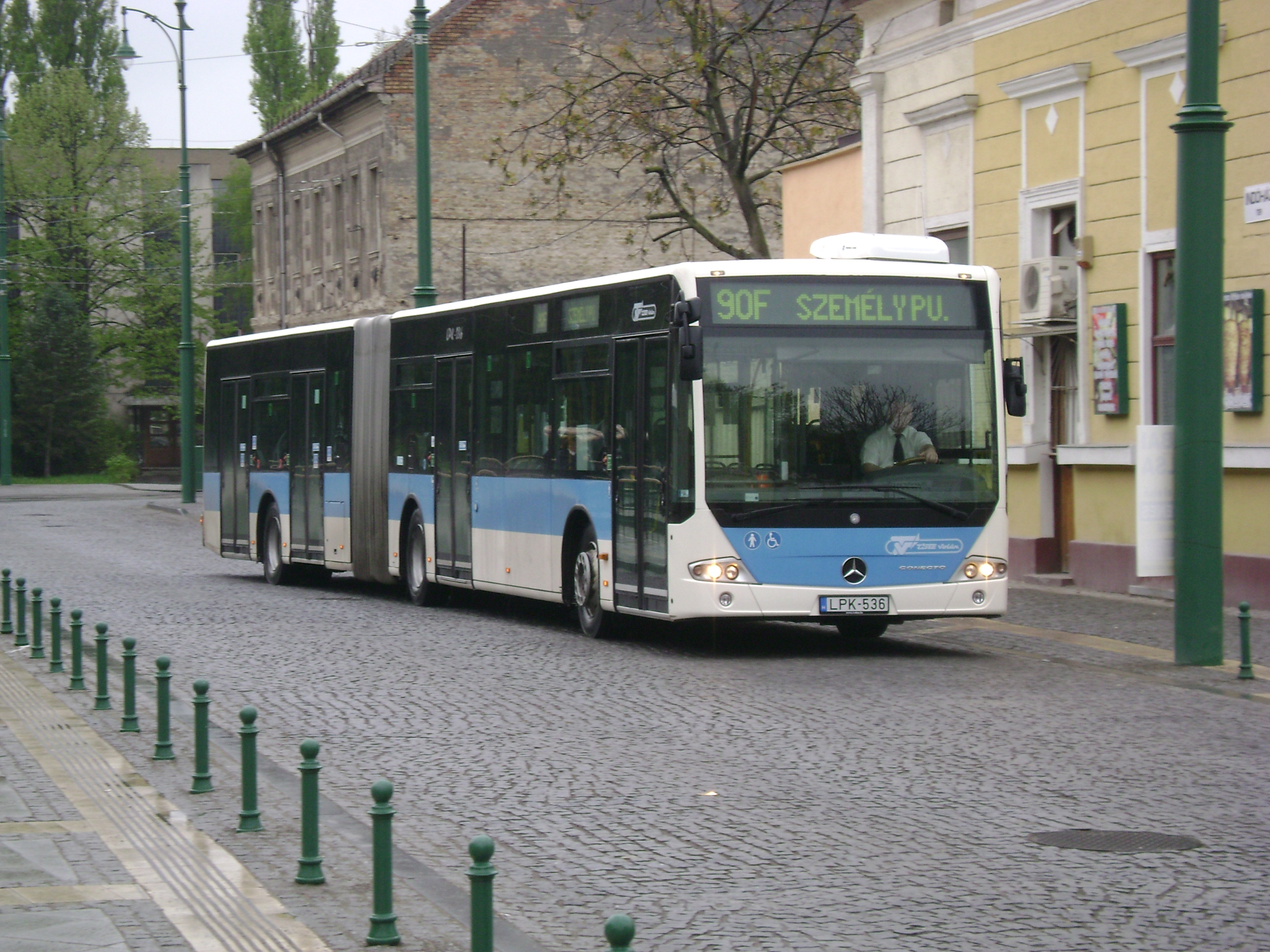 Mercedes-Benz Conecto 628.320 a szegedi Indóház téren